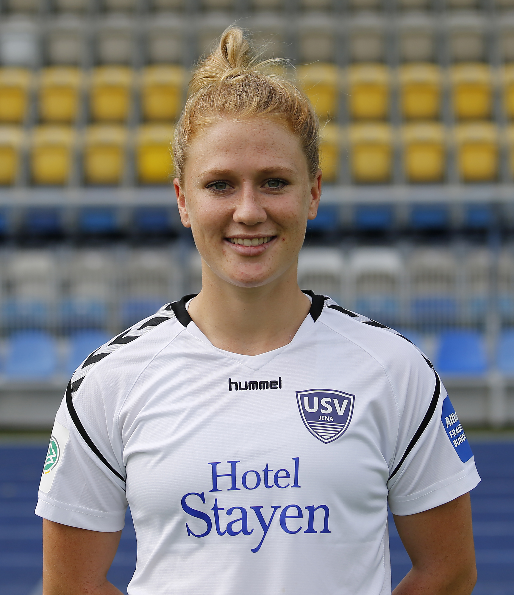 Bott, Catherine Joan